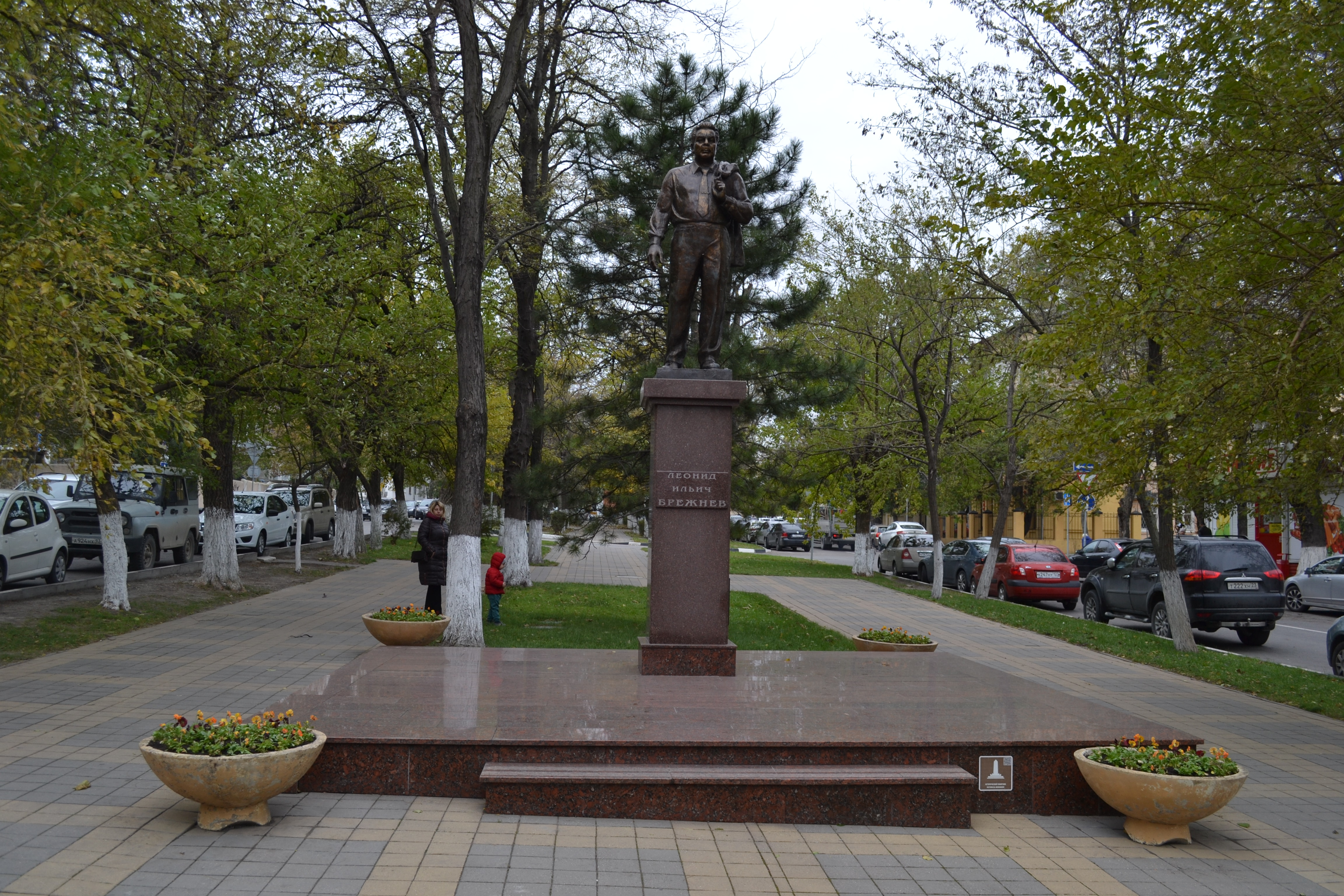 Памятник Л.И. Брежневу. Ноябрь 2016 г.